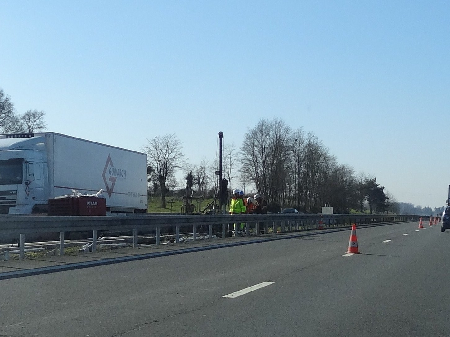 Travaux sur l'autoroute A81 pour le passage de la LGV Bretagne-Pays de la Loire par un pont-rail.